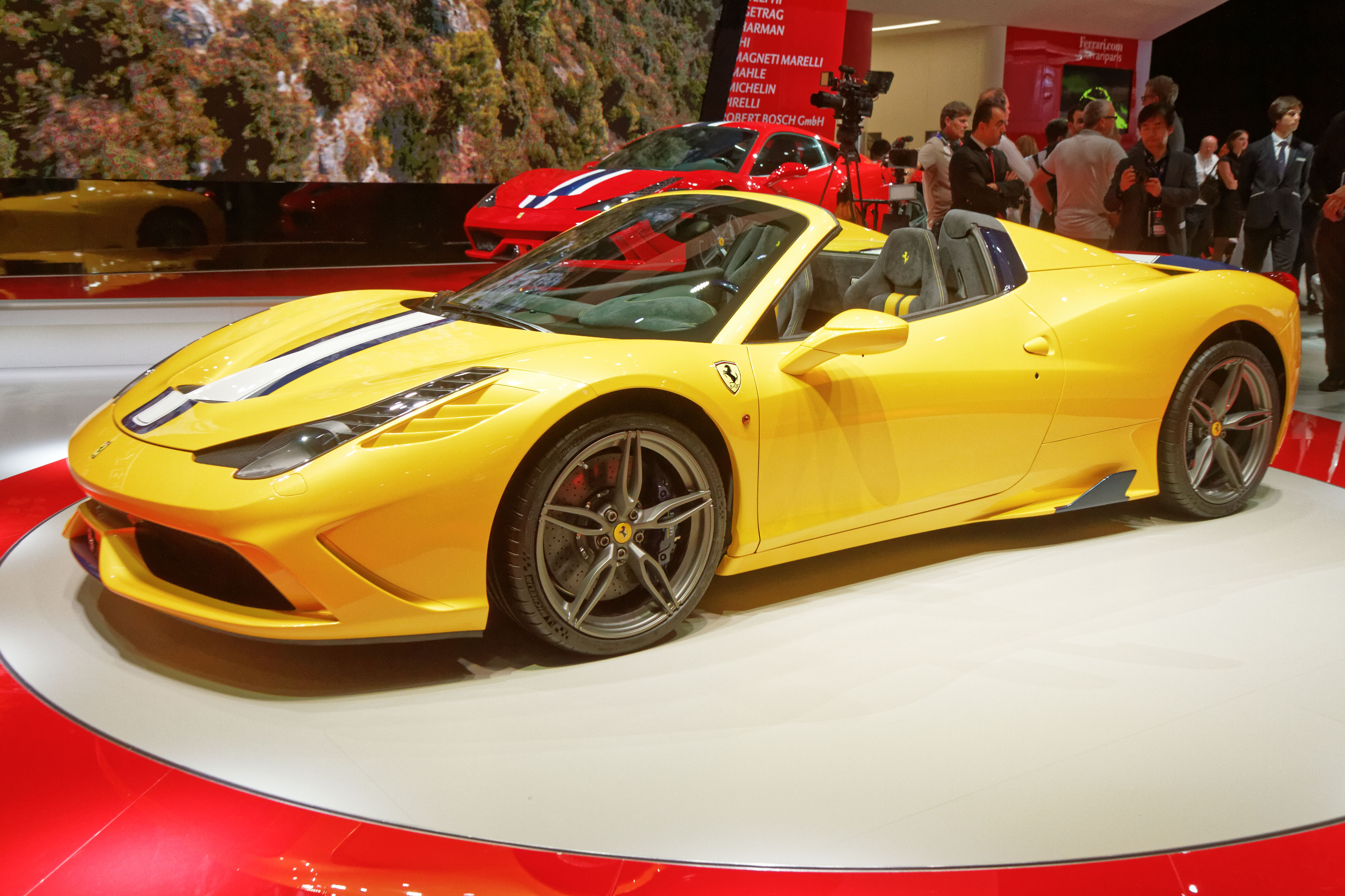 Une Ferrari 458 Speciale A présentée lors du mondial de l'automobile de Paris 2014.